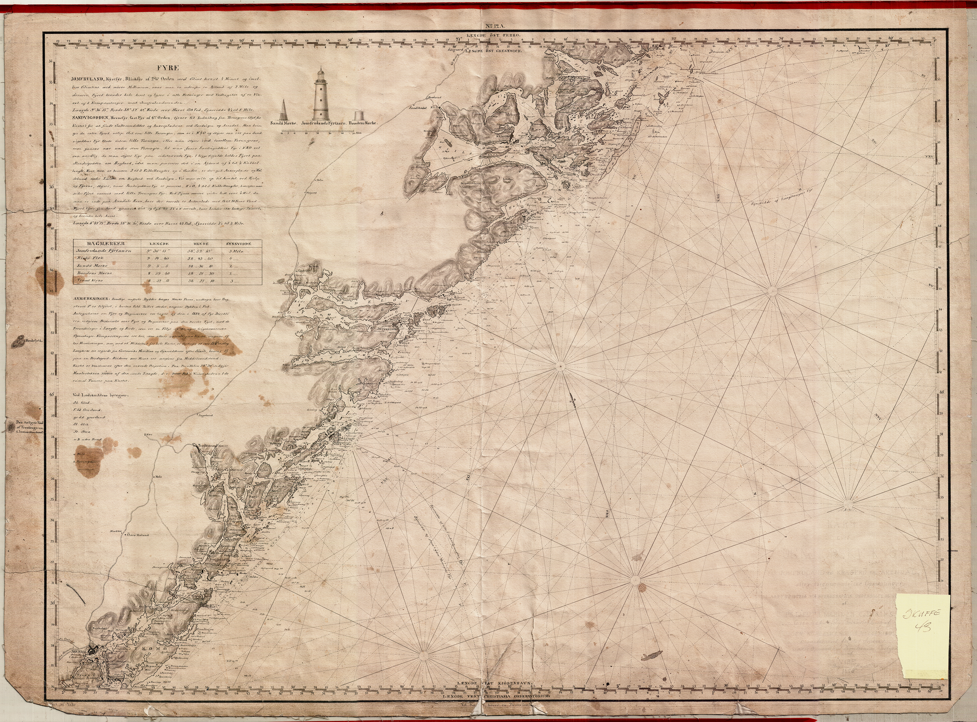 Kart over kysten av Norge fra Arendal til Kragerø fra 1855. Omtrentlig målestokk 1:100 000. Original dokumentstørrelse ca 85 cm x 63 cm. Et eksemplar befinner seg hos Statens kartverk Sjø i Stavanger.